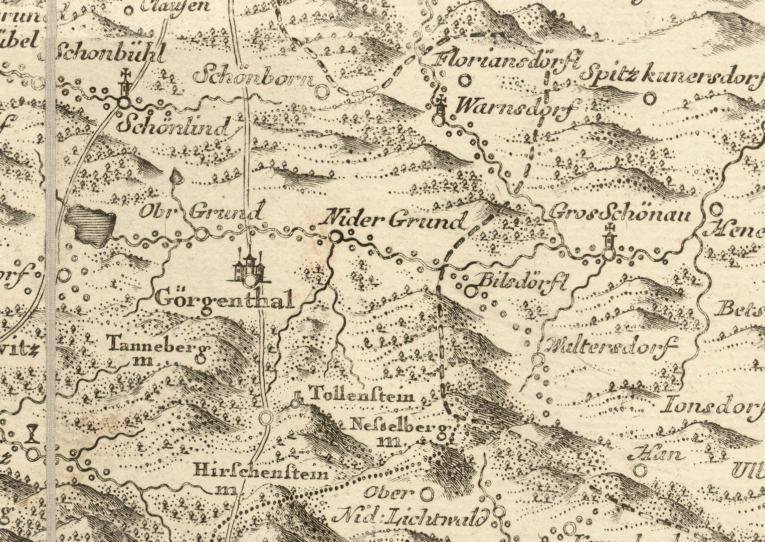 Dolní Podluží - Niedergrund na barokní Müllerově mapě Čech